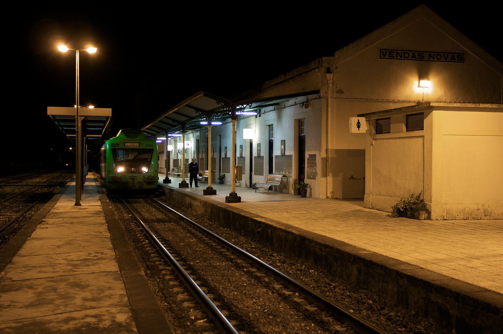 Tipo: Comboio Regional 4804 [Beja - Barreiro] Local: Estação de Vendas Novas [Linha do Alentejo, PK 56 • Linha de Vendas Novas, PK 69] Data e hora: 11 de Novembro de 2009 [18h41] Material: Automotora 0368 [Unidade Simples Diesel - Allan Renovada]